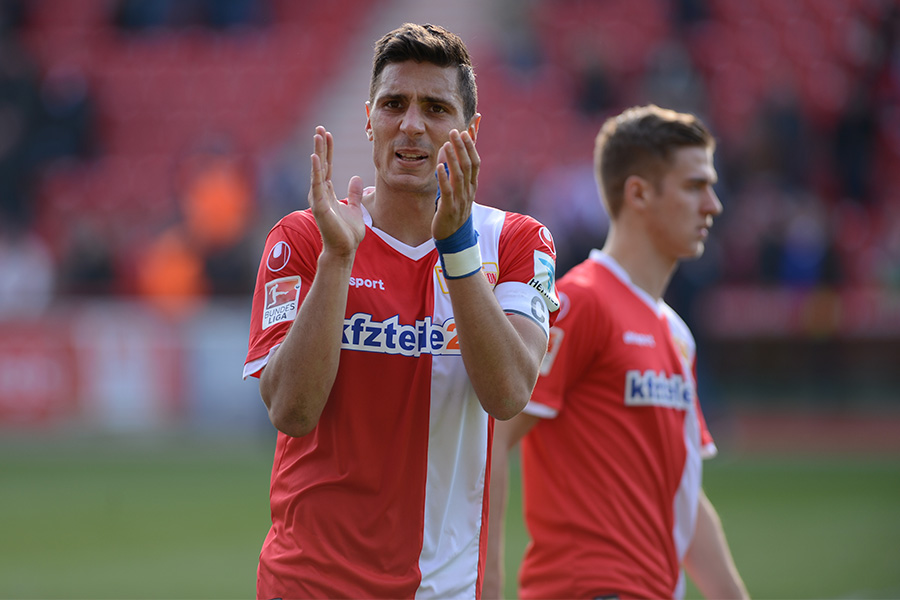 Damir Kreilach bedankt sich bei den Fans für die Unterstützung